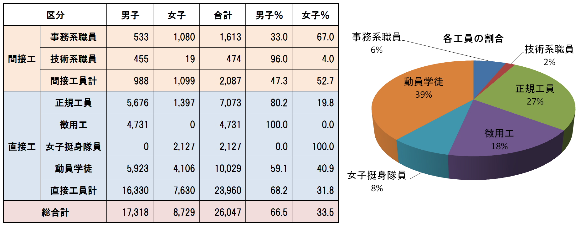 中島飛行機半田製作所の従業員数（1945年8月現在）。小松工場の約3000人を含む。